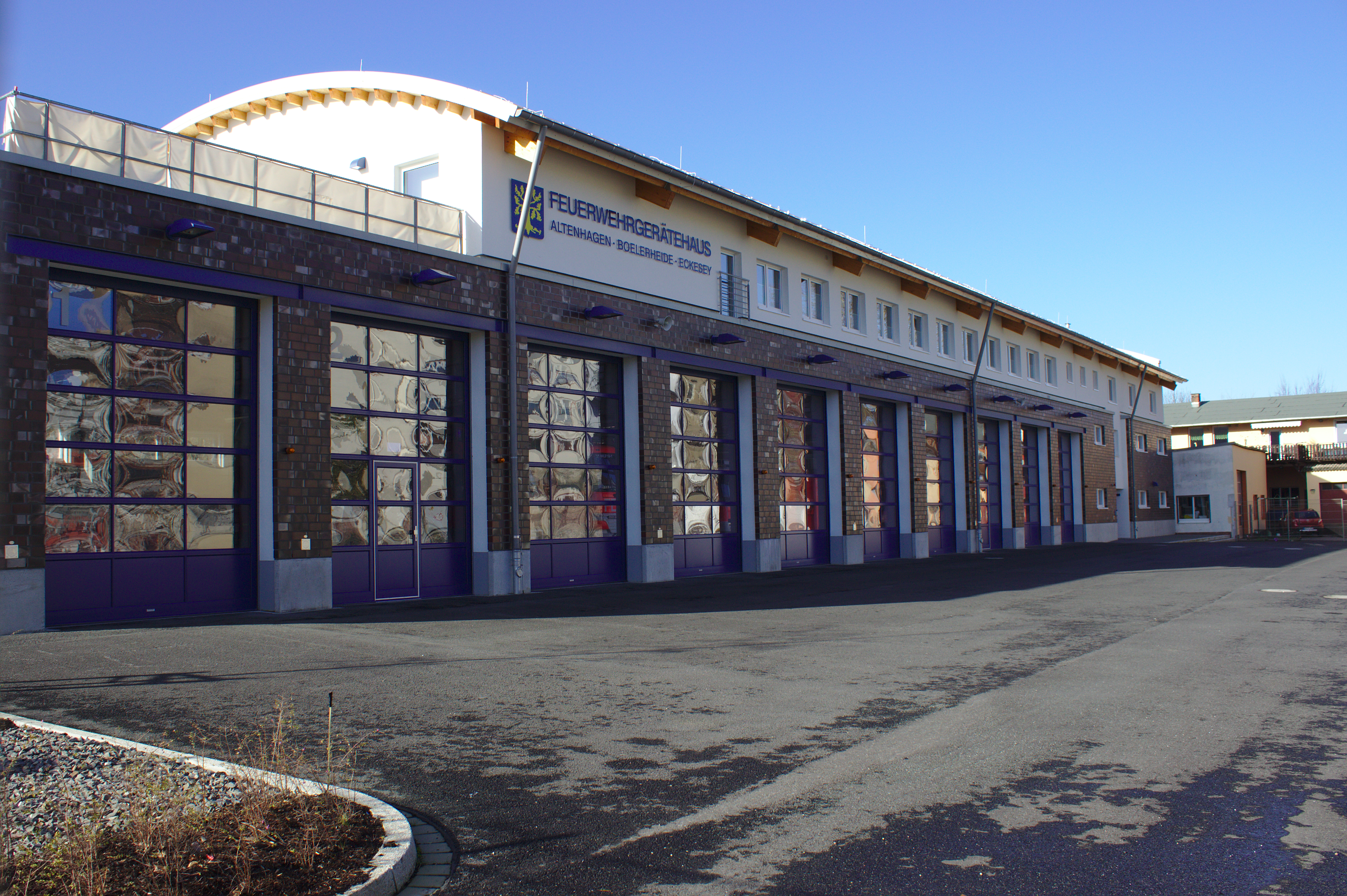 Neues Gerätehaus der Freiwilligen Feuerwehren von Altenhagen, Boelerheide und Eckesey. In der unteren Etage sind die Fahrzeughallen, darüber Sozial- und Schulungsräume.